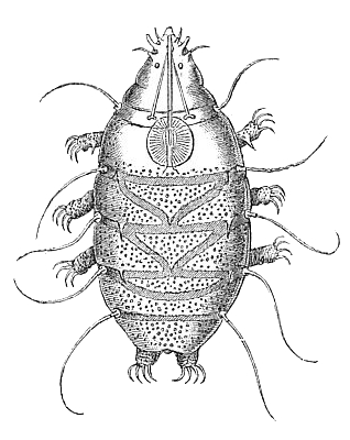 Echiniscus sp.